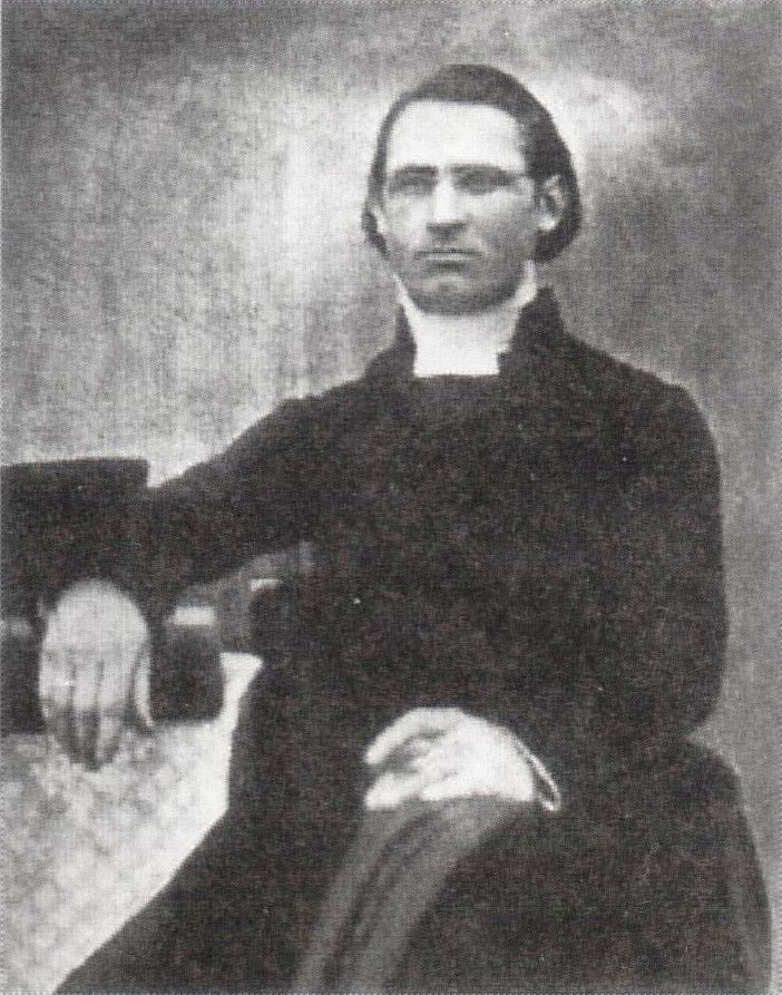 Kappalainen Johan Gabriel Ståhlberg (1832–1873), presidentti K. J. Ståhlbergin isä.